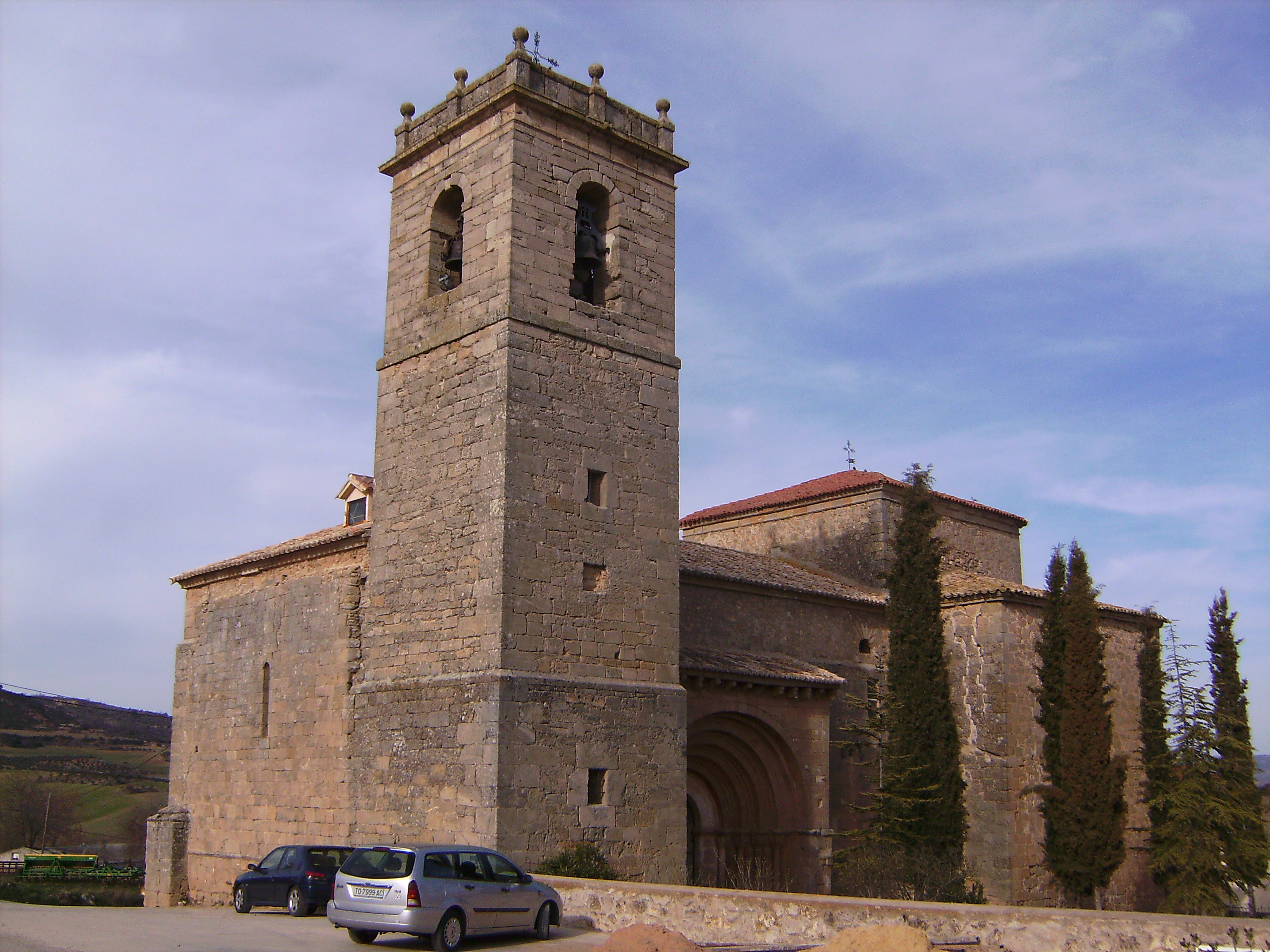 Millana - Iglesia de Santo Domingo de Silos (Exterior)